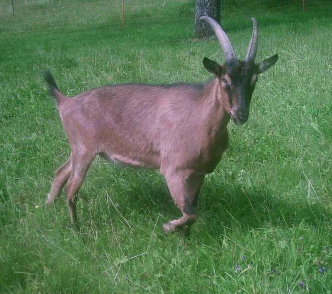 Hausziege in Leoni am Starnberger See